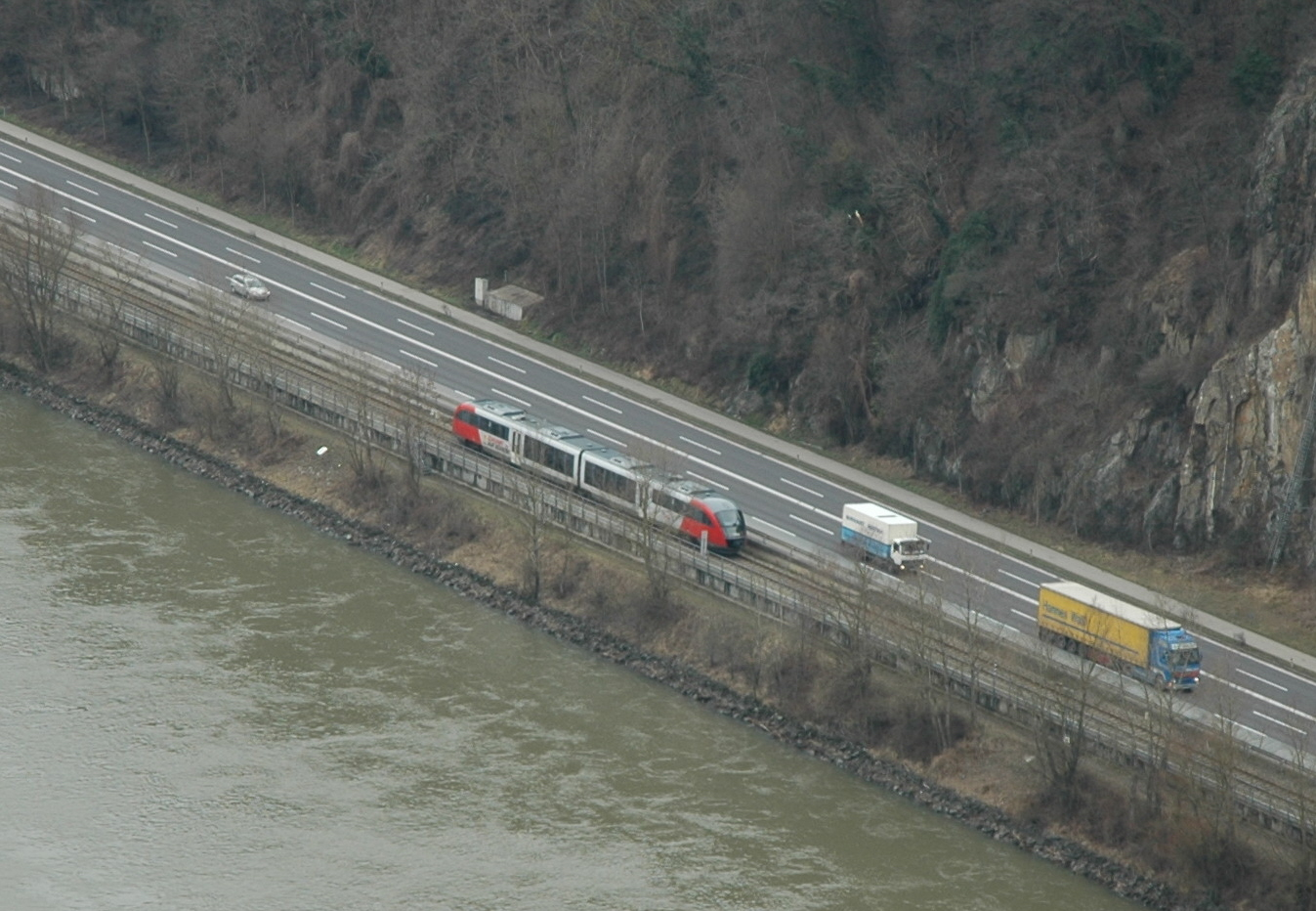 Zuggarnitur der Mühlkreisbahn an der Donau zwischen Linz und Puchenau